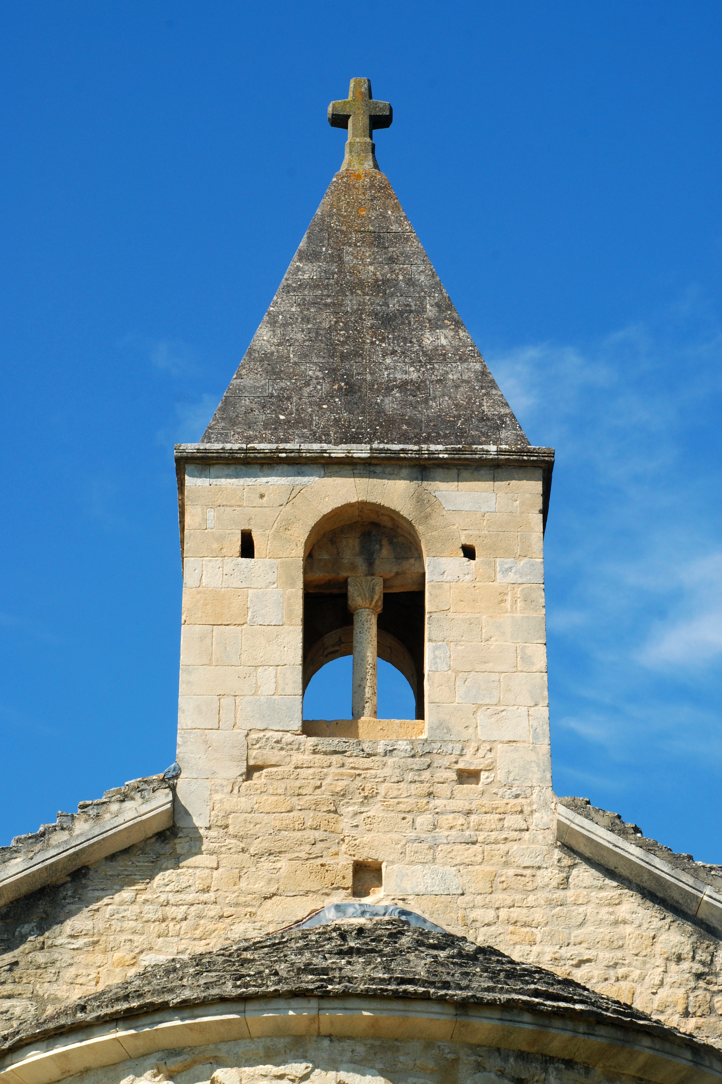 France - Gard - Chapelle Saint-Pierre de Vénéjan .